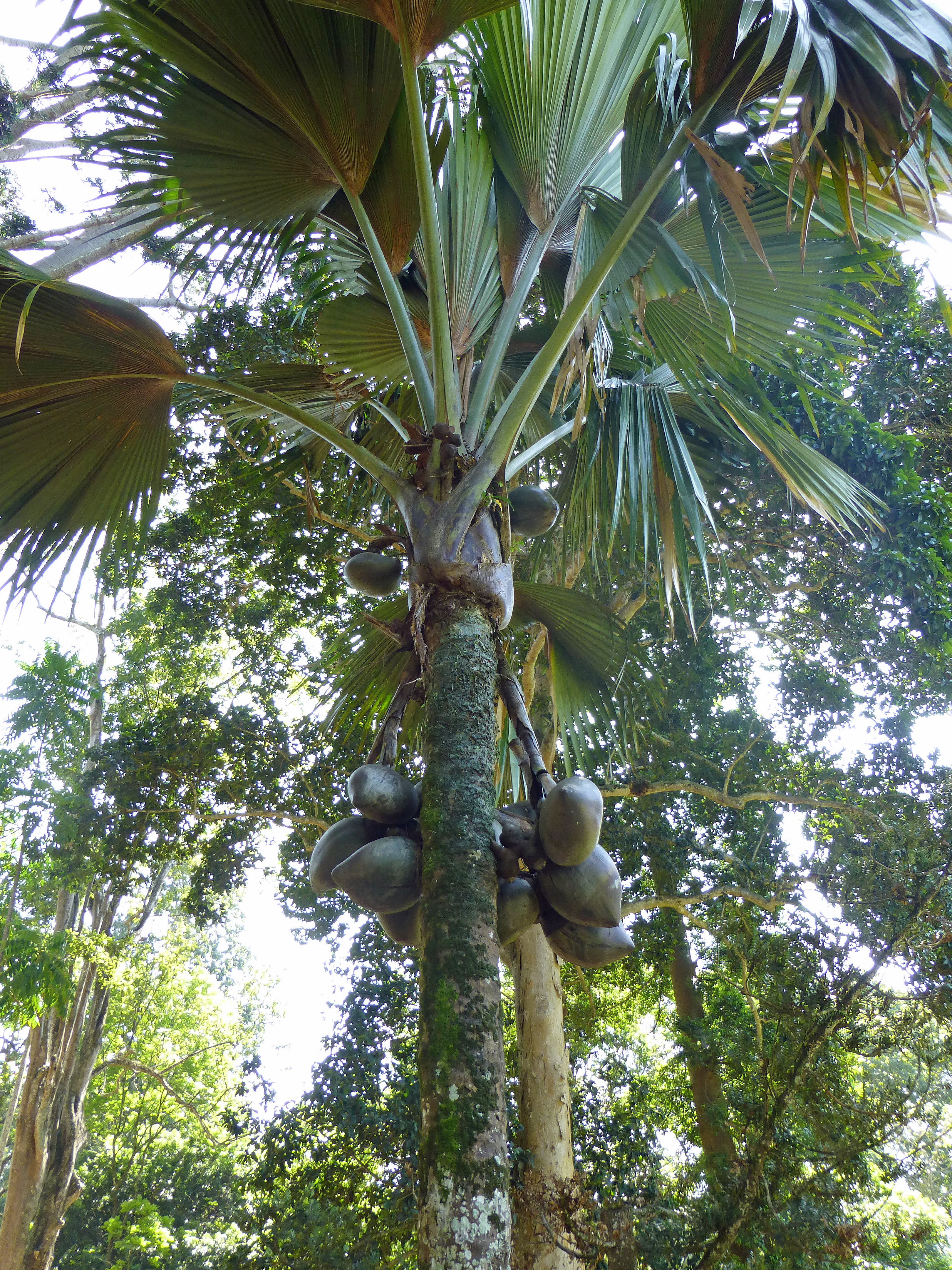 Coco-fesse (Lodoicea maldivica), au Jardin botanique de Kandy (Sri Lanka)